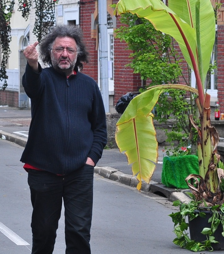 Paulo Anarkao en 2009